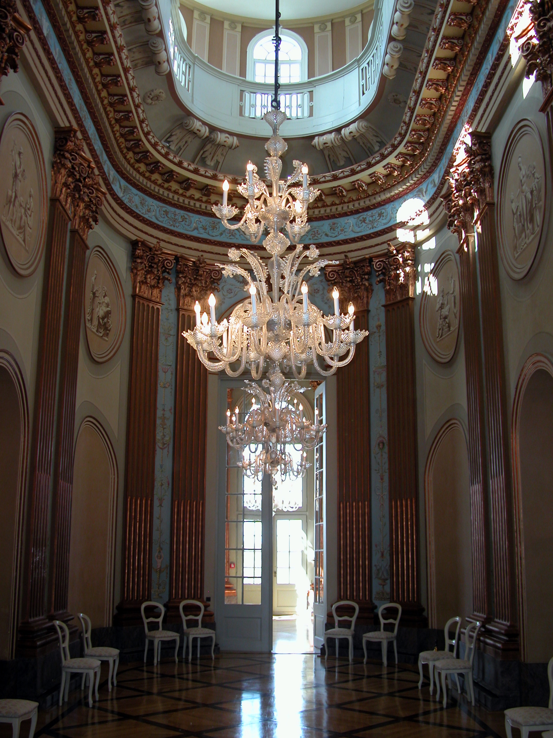 Braunschweig: Schloss Richmond, zentraler Raum (Blickrichtung Westen)